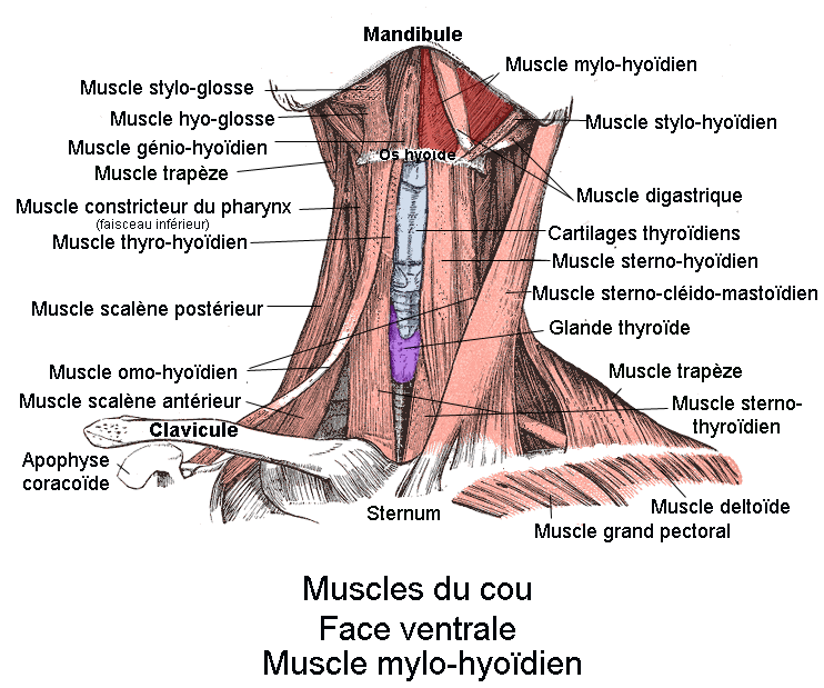 Muscle mylo-hyoïdien. Vue inférieure. Anatomie humaine